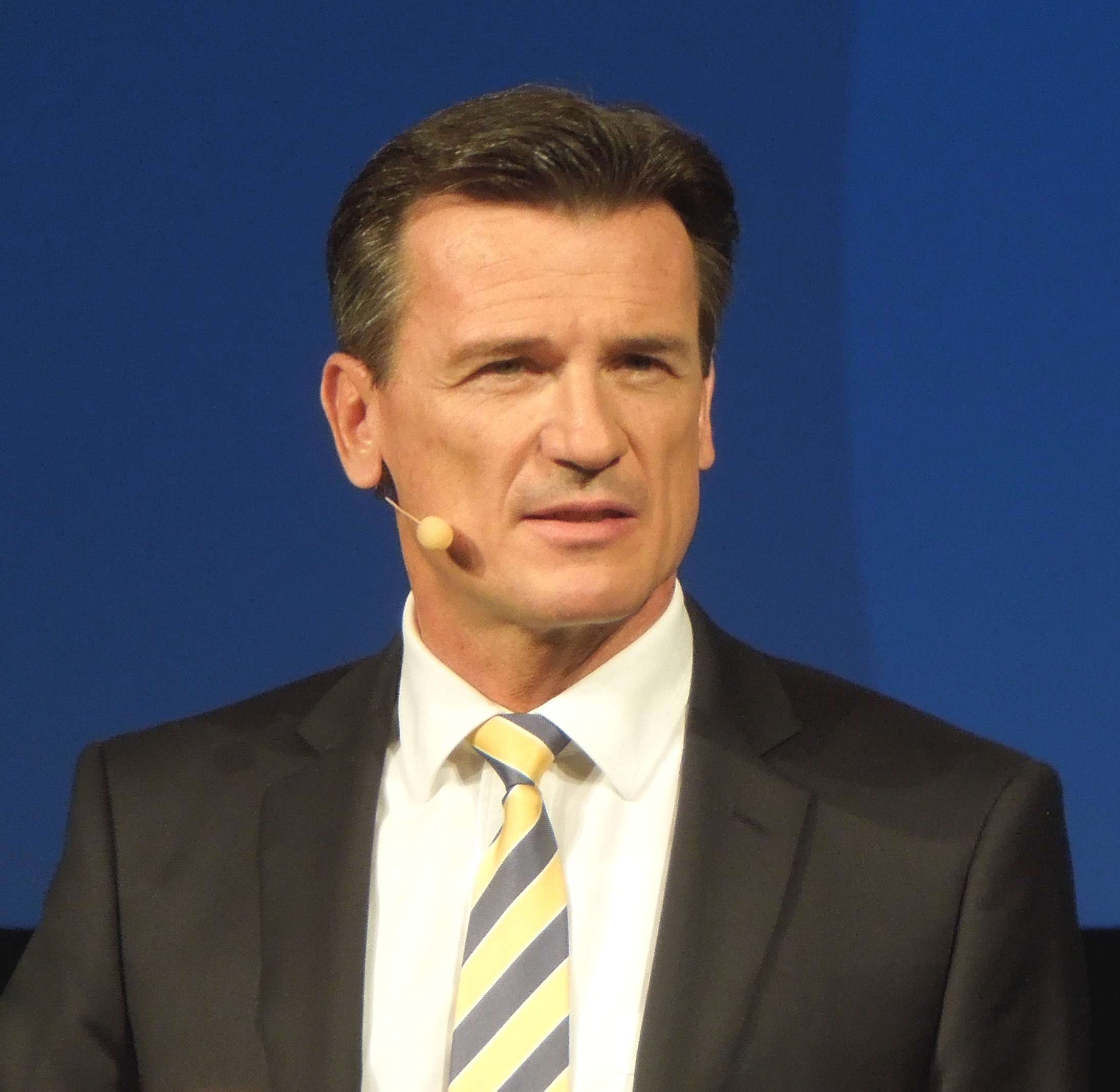 Dr. Wolfgang Bernhard, Member of the Board of Management Daimler AG, Head of Daimler Trucks and Daimler Buses in Magdeburg, 3. Juli 2014